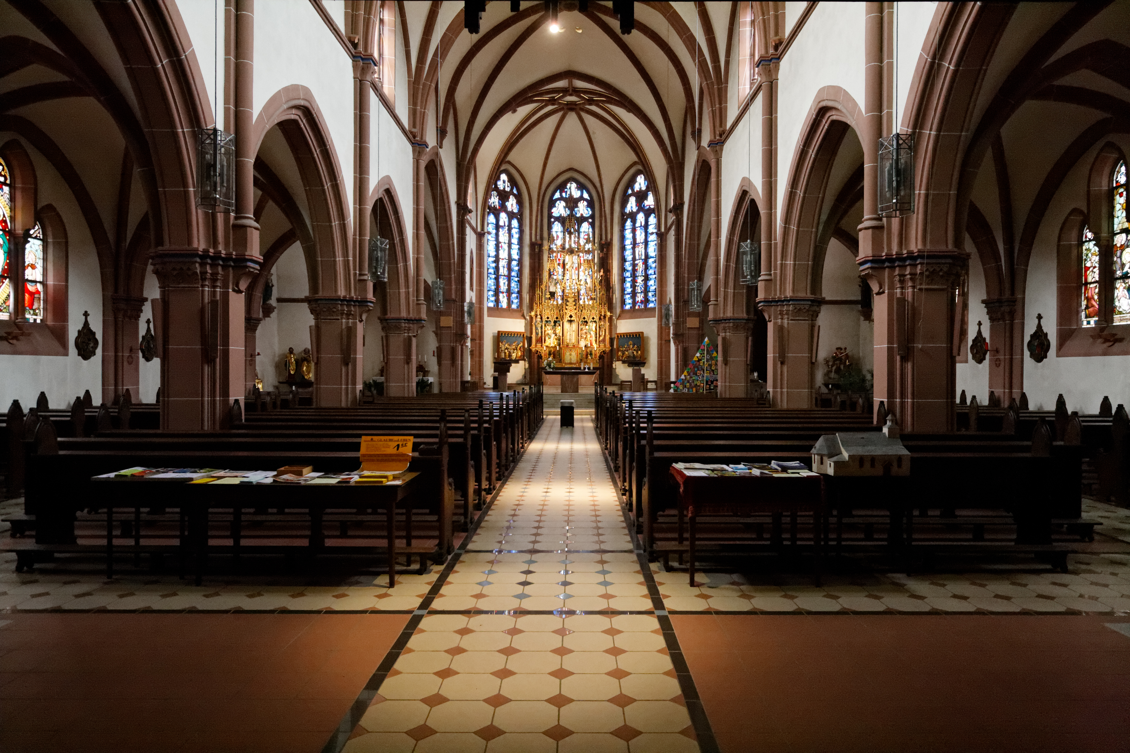 Katholische Kirche St. Nazarius in Ober-Roden (Stadt Rödermark), erbaut 1894–1896